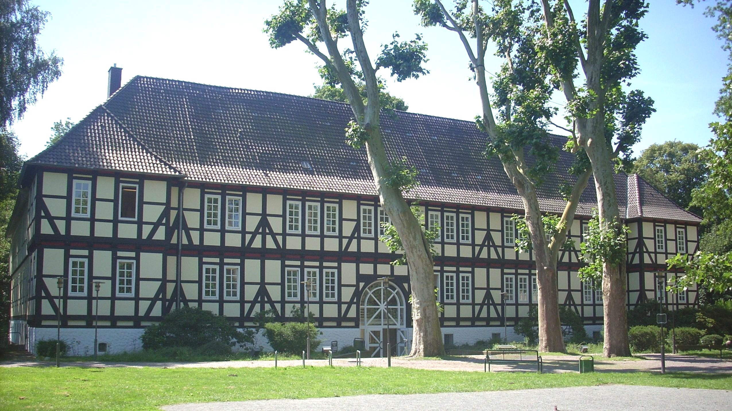 Burgdorf (Region Hannover), Schloss, Nordseite (Stadt)